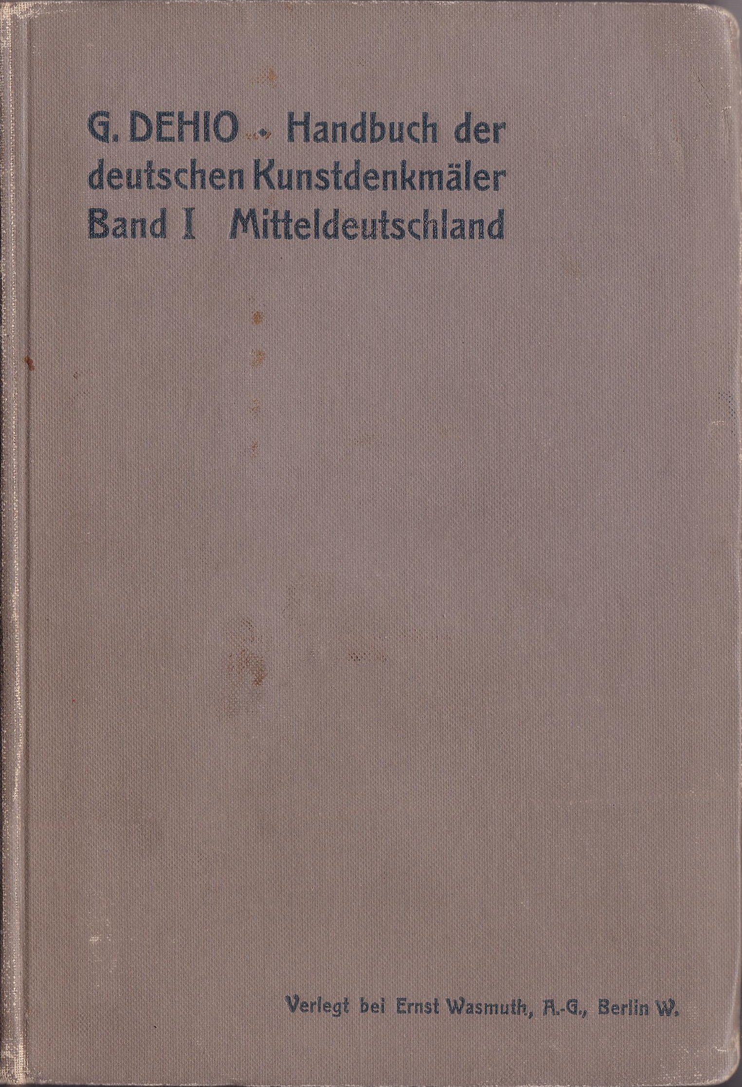 Scan vom Einband des Titels Georg Dehio: Handbuch Deut. Kunstdenkmäler, Berlin 1905